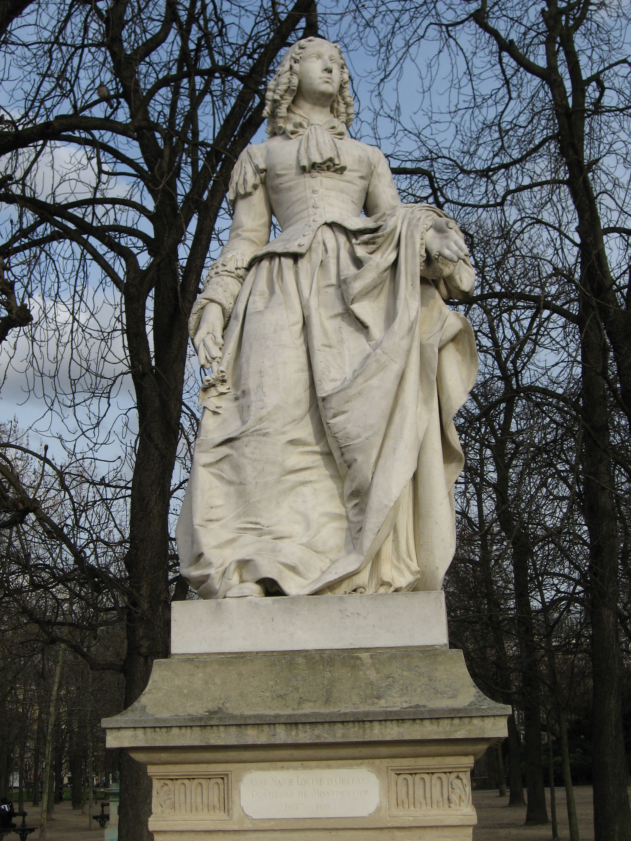 Anne Marie Louise d'Orléans, Duchesse de Montpensier (1627-1693) par Camille Demesmay